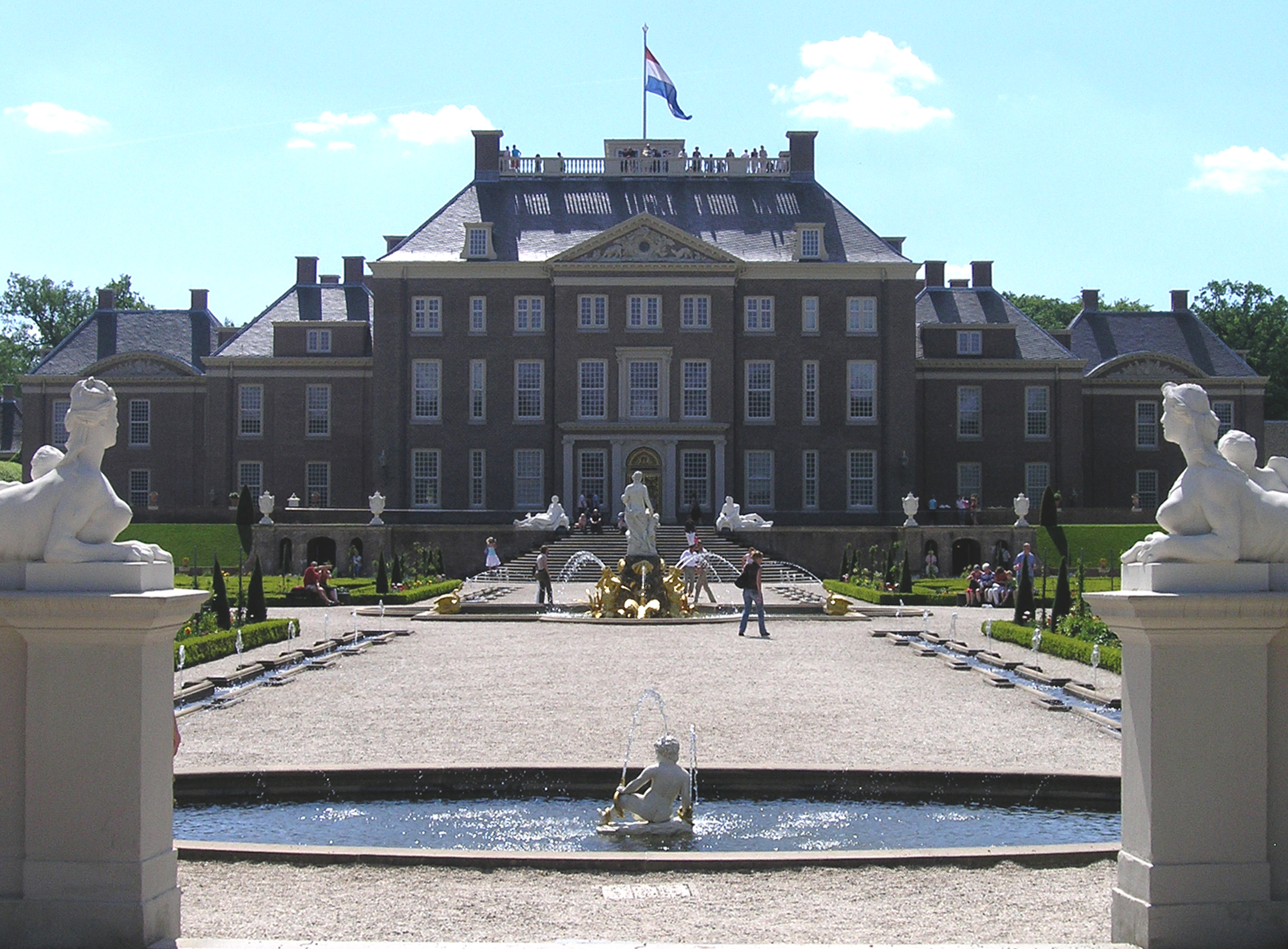 Paleis Het Loo; Zicht op achterzijde paleis tussen de Sfinxen